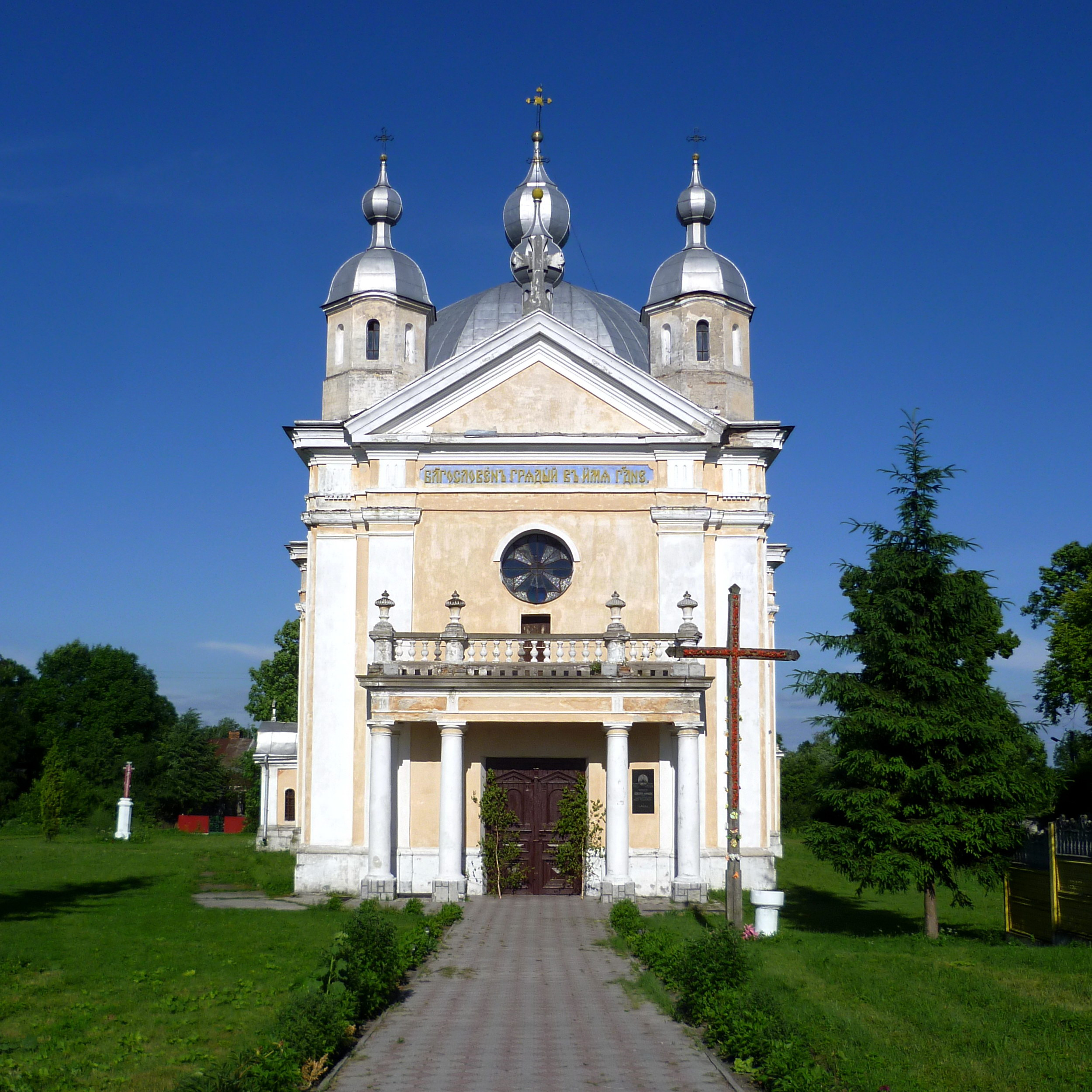 Церква Різдва Богородиці (1854-57 рр.) - вигляд із заходу - в м.Угневі (вул.Валова, 7) Сокальського району Львівської області України